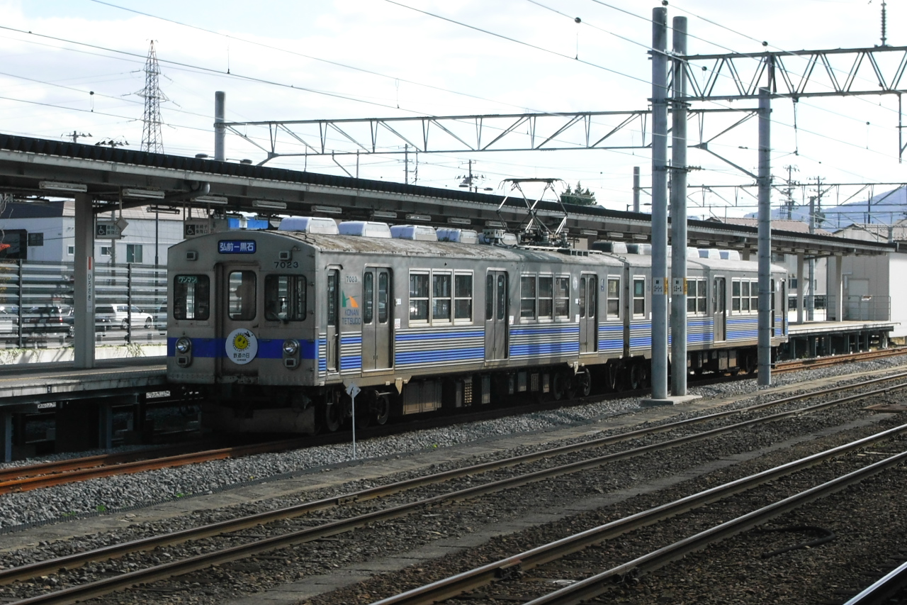 弘前駅にて弘南鉄道弘南線。元東急7000系ですね。